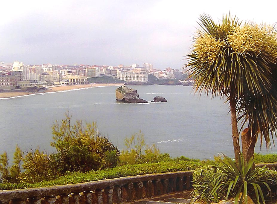 Vue op Biarritz.